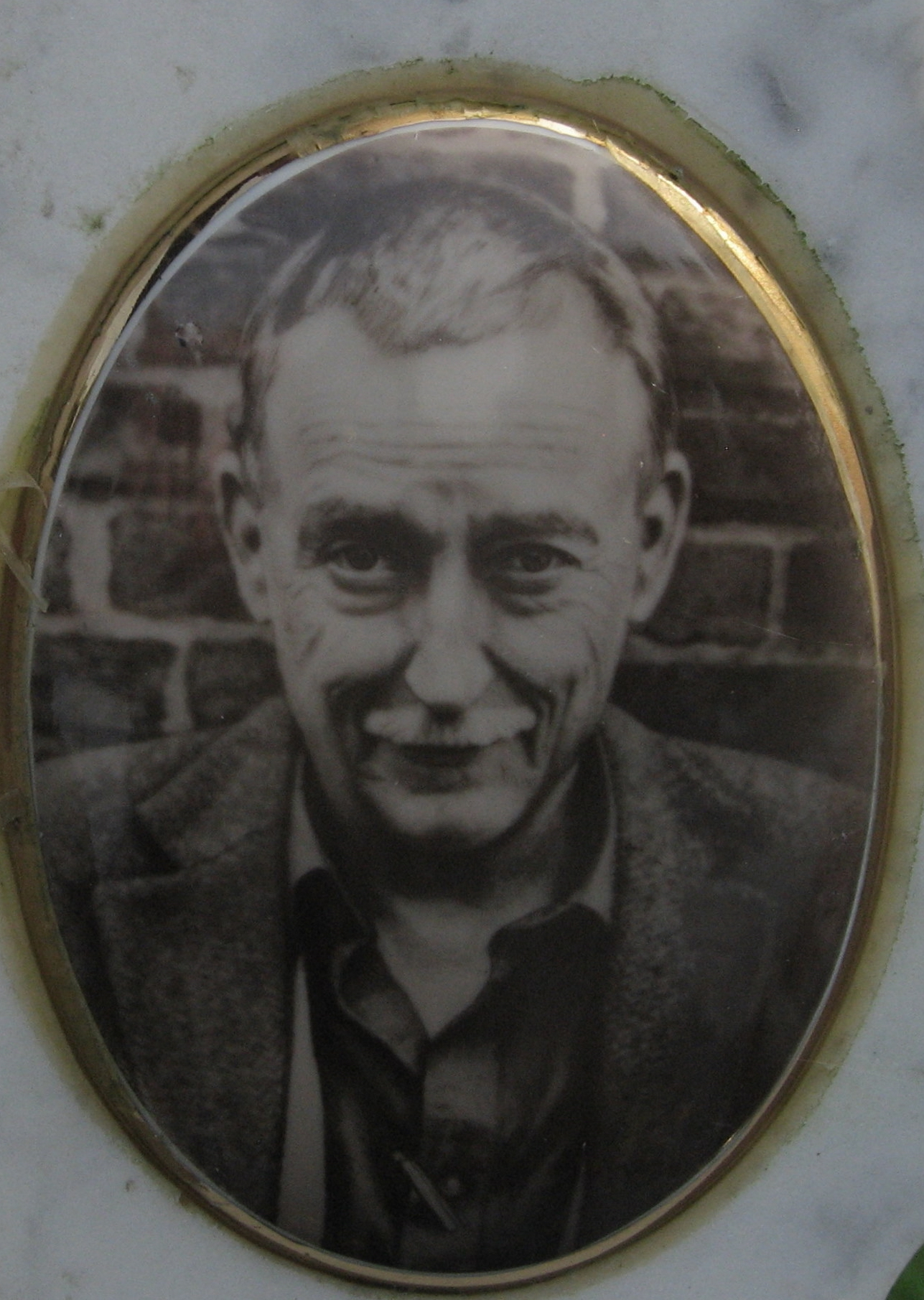 Portrait des Schriftstellers Christian Geissler (* 25.12.1928, † 26.08.2008) auf seinem Grabkreuz. (Porzellanbild)